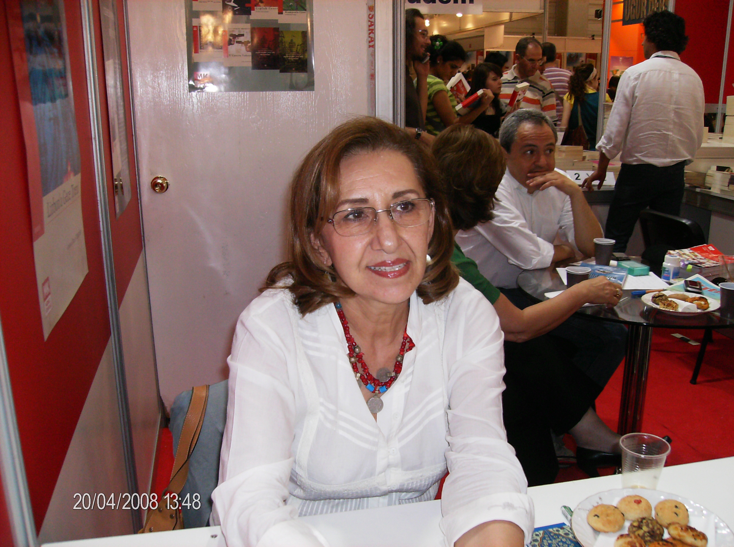 kendi çekimim. 13. izmir kitap fuarı